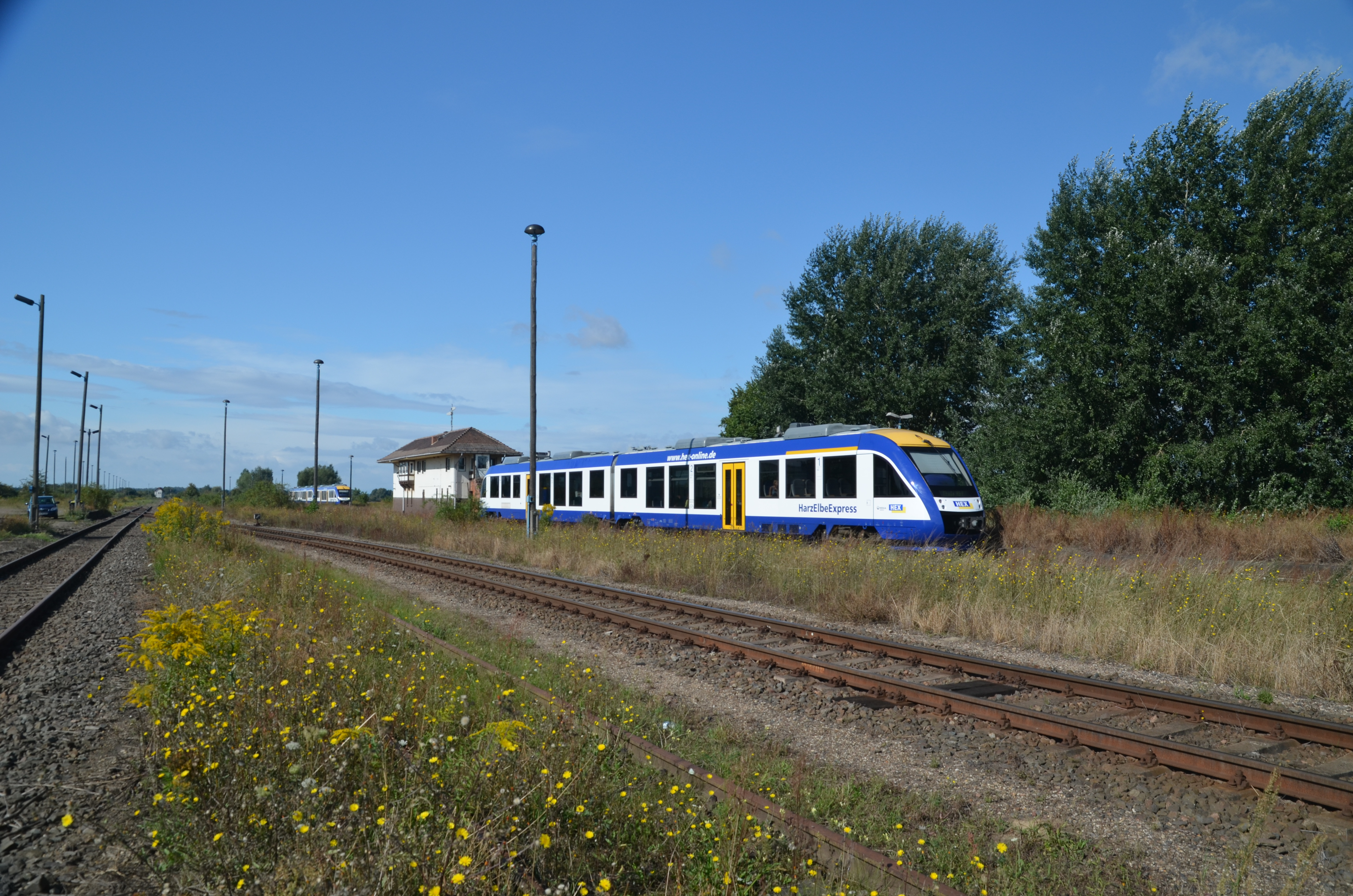 Zugkreuzung in Blumenberg